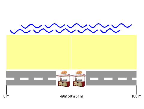 Iceseller problem 4